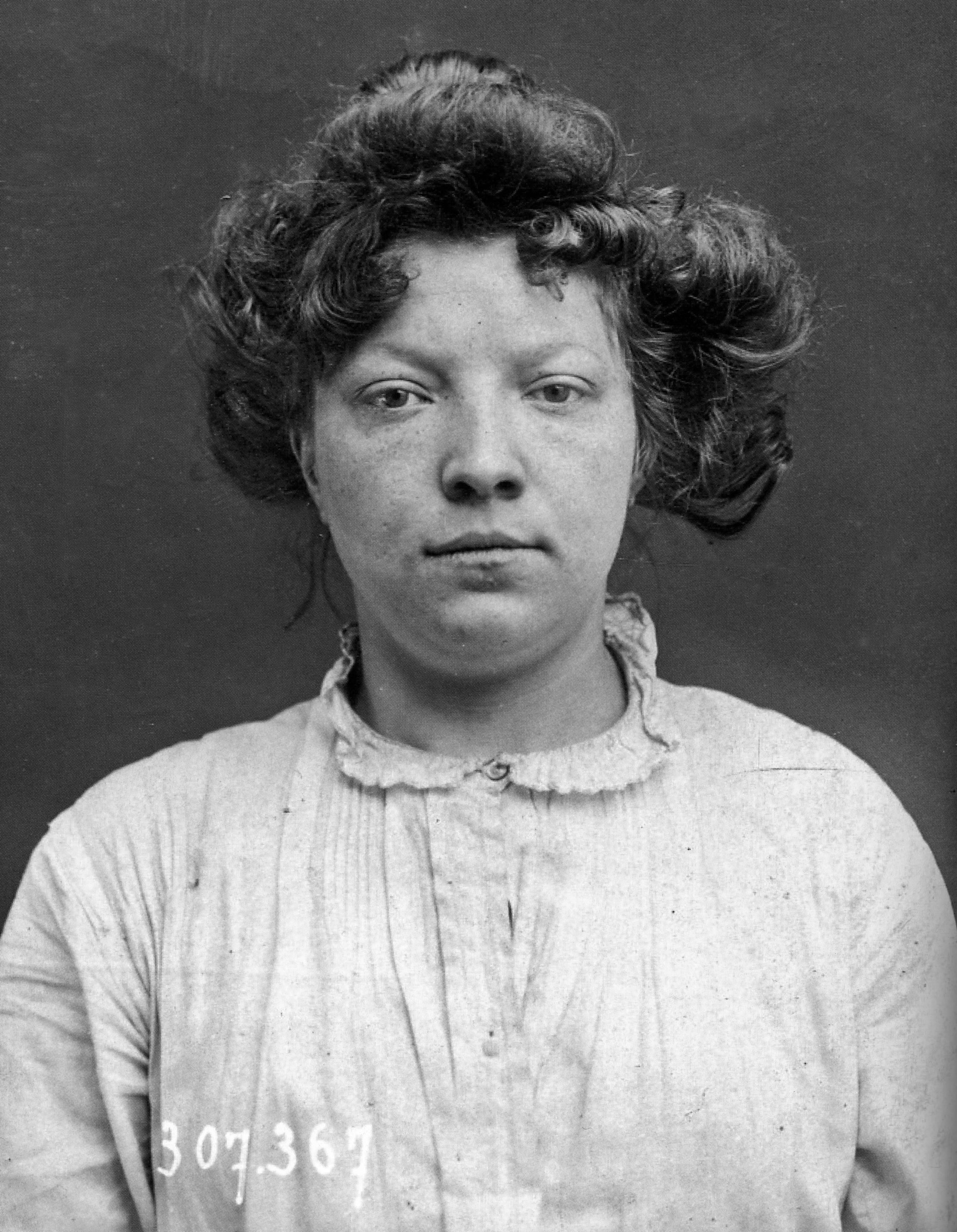 Amélie Élie (ou Hélie), dite Casque d'Or.